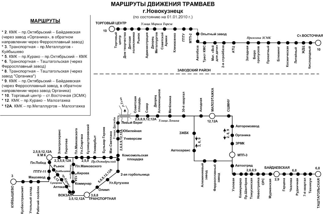 Схема маршрутов трамвая г.Новокузнецка на 01.01.2011 г.